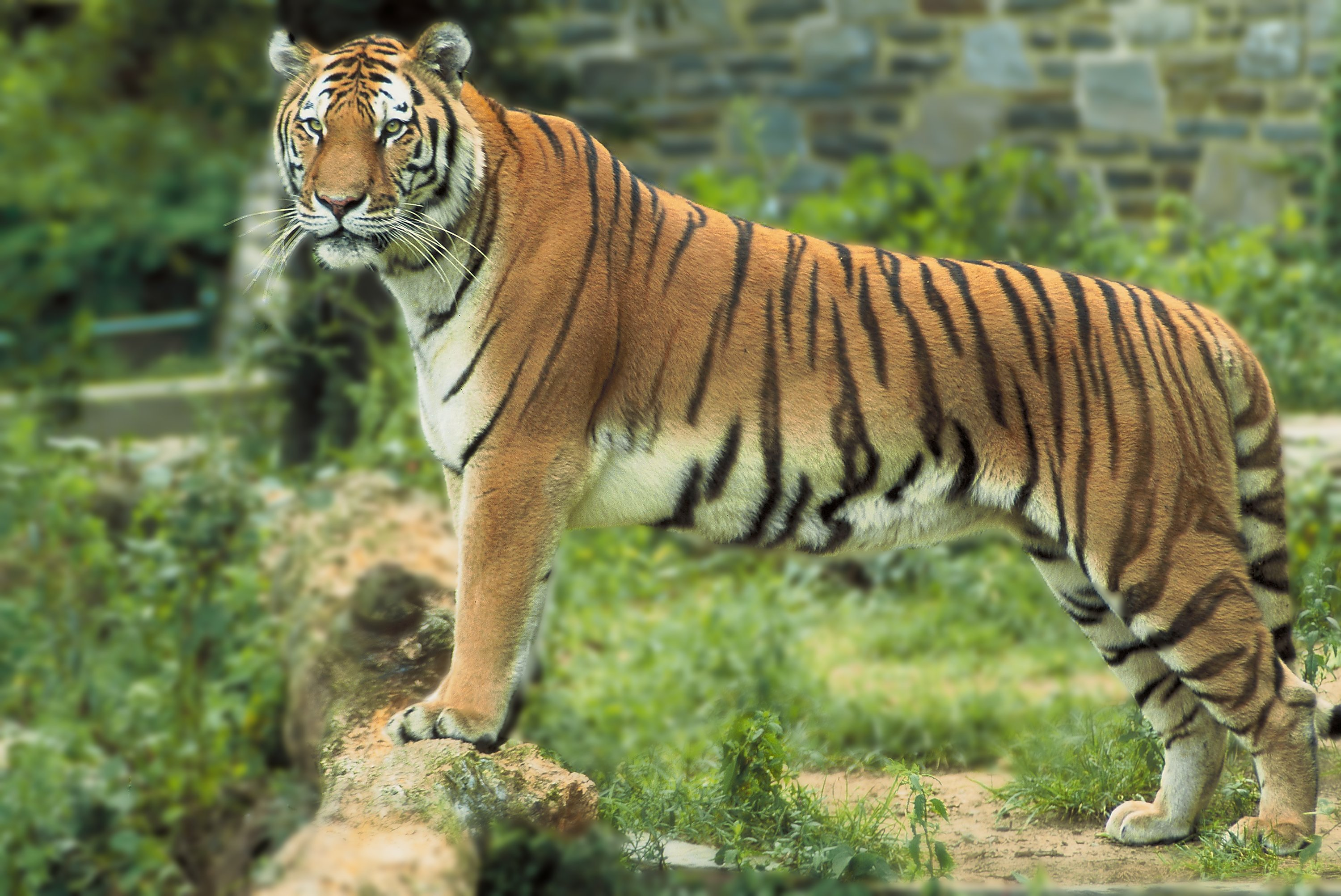 Panthera tigris tigris, Bengal Tiger, Indischer Tiger oder Königstiger.